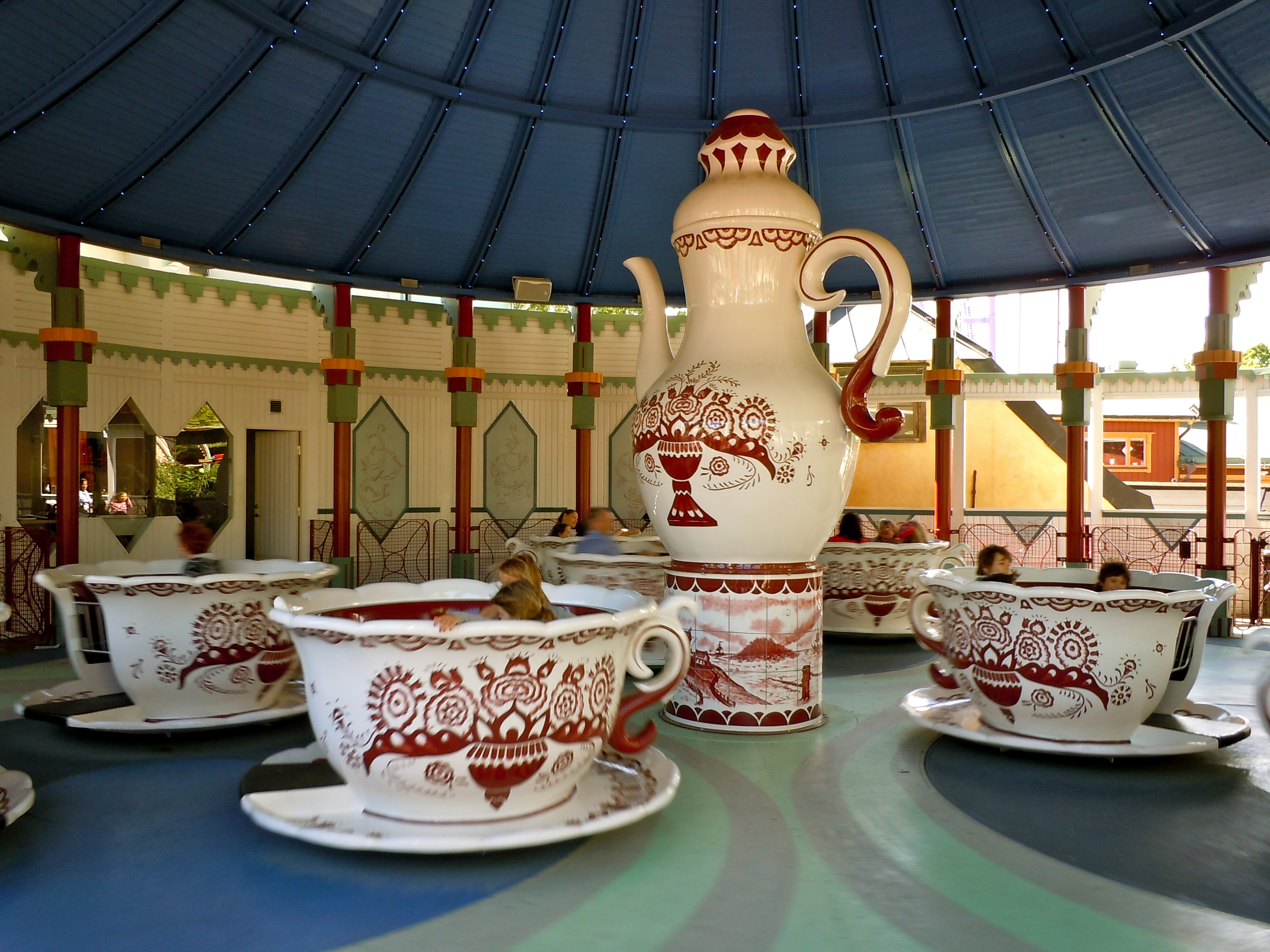 Tekopparna på Gröna Lund.